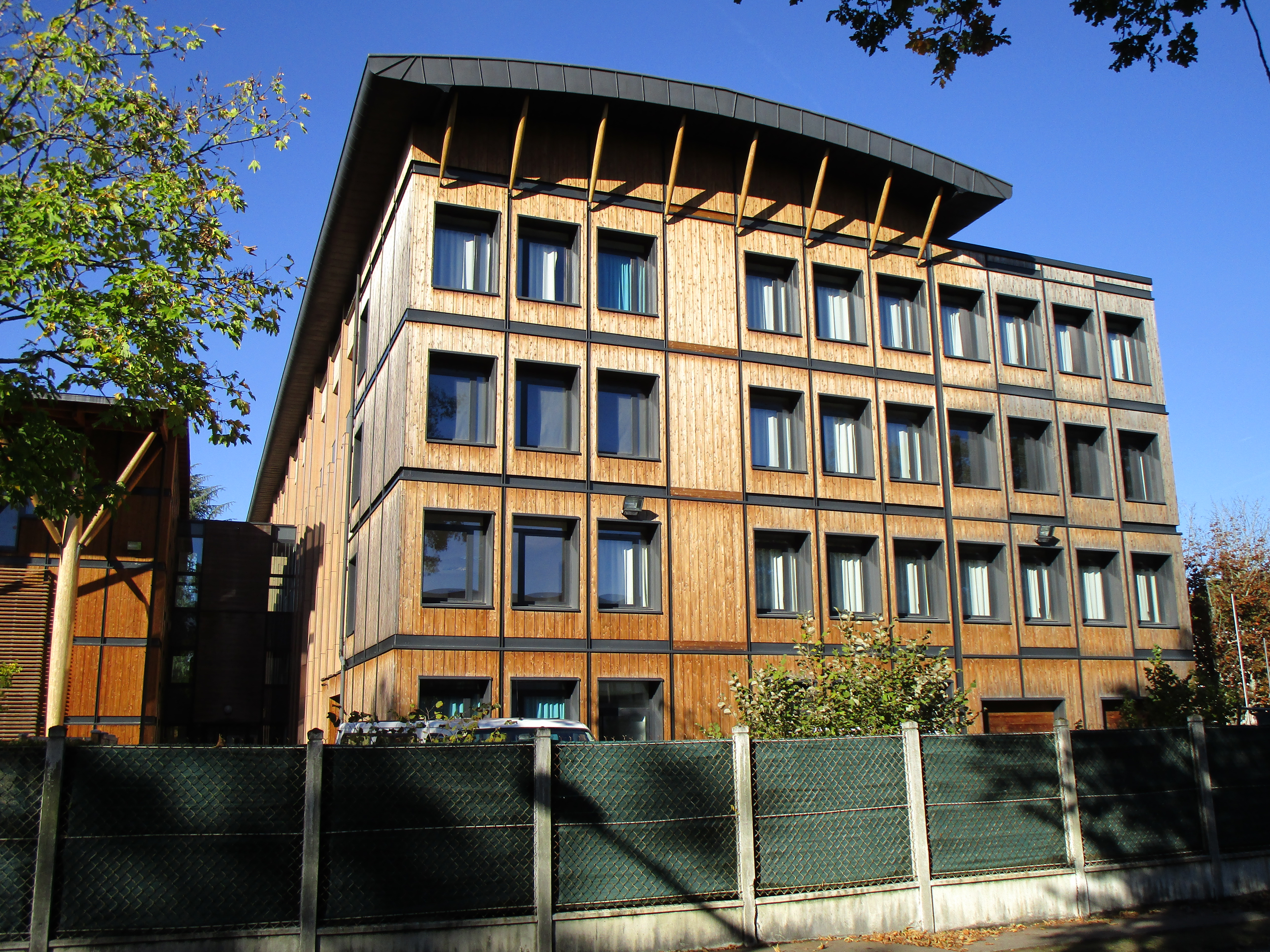 Le lycée professionnel Victor Laloux de Tours, dans le quartier Montjoyeux-Grandmont.